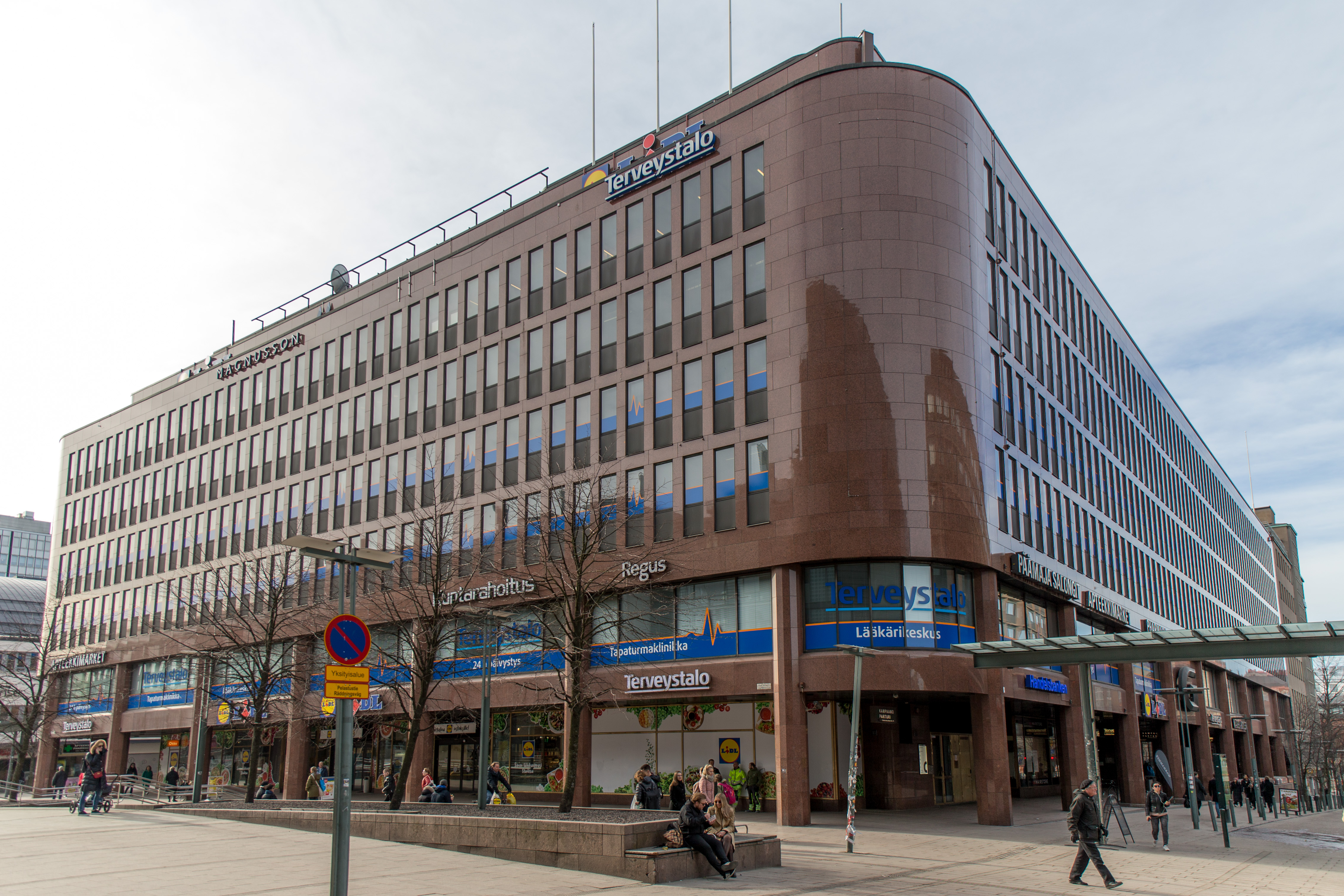 Kampin Terveystalossa on 24/7 lääkäripäivystys, laboratorio ja röntgen